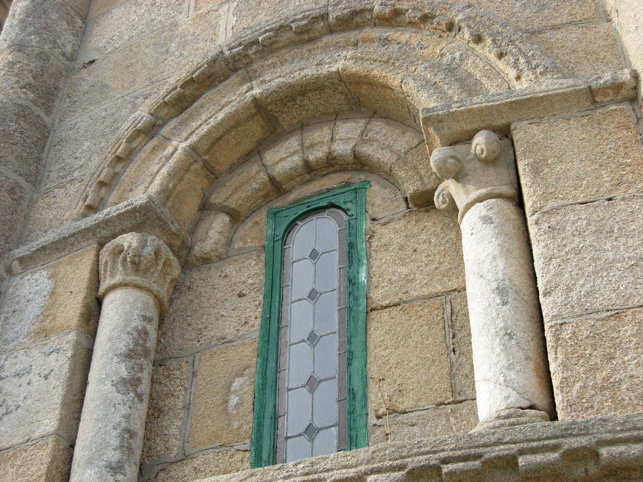 Ventá da ábsida da Igrexa de San Martiño de Sobrán - Vilagarcía de Arousa - Pontevedra